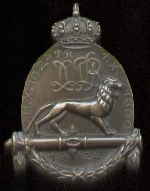 Erinnerungs-Abzeichen, 100 Jahre 1. Bayerisches Feld-Artillerie-Regiment "Prinz Regent Luitpold" und 24 Jahre 7. Bayerisches Feld-Artillerie-Regiment "Prinz Regent Luitpold" (sogenannte "Luitpoldkanoniere")